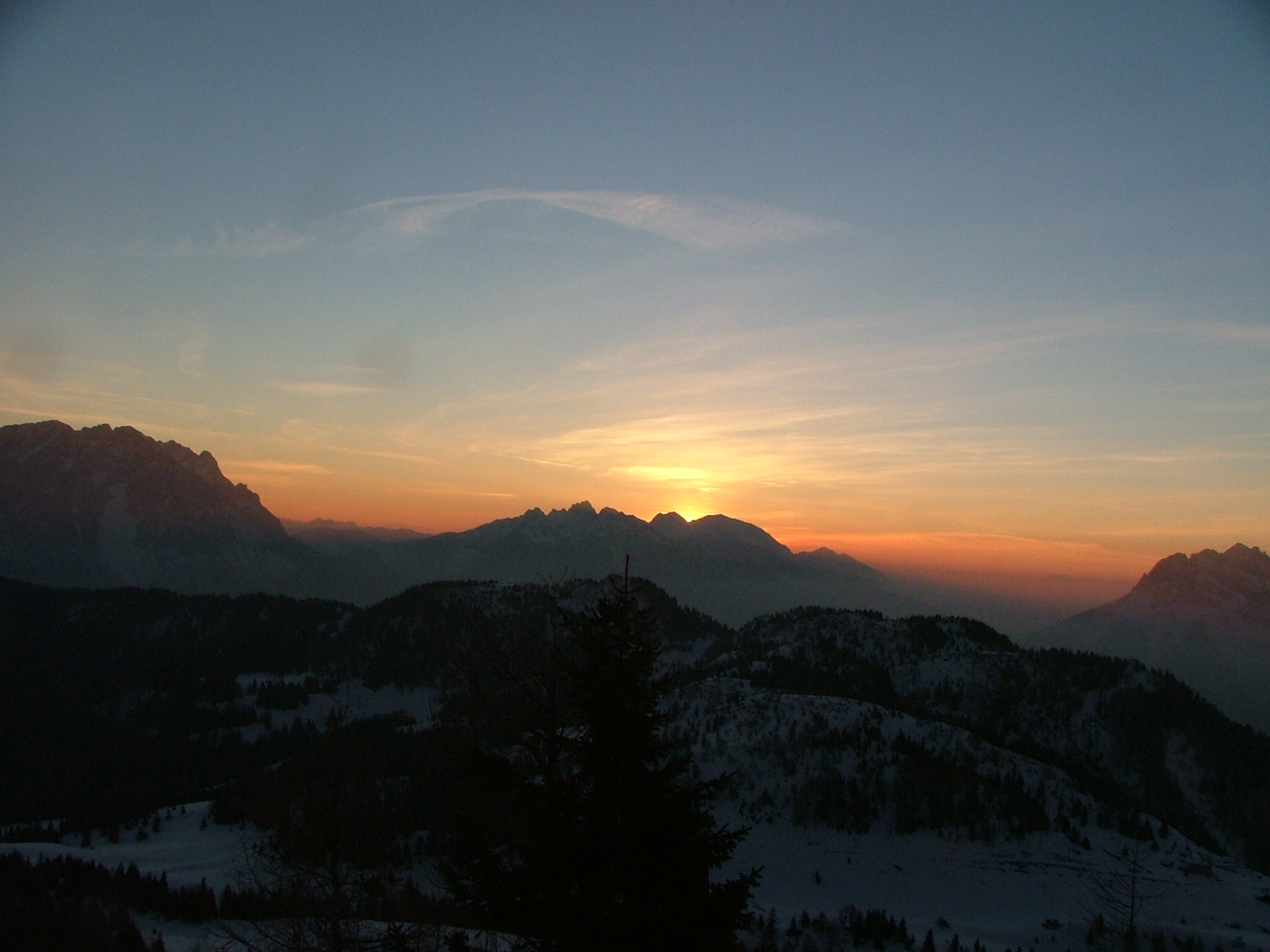 alba da rif.Ciareido, Lozzo di Cadore, Marmarole Dolomiti, Belluno, Italy